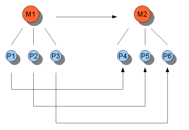 Selbst erstellt